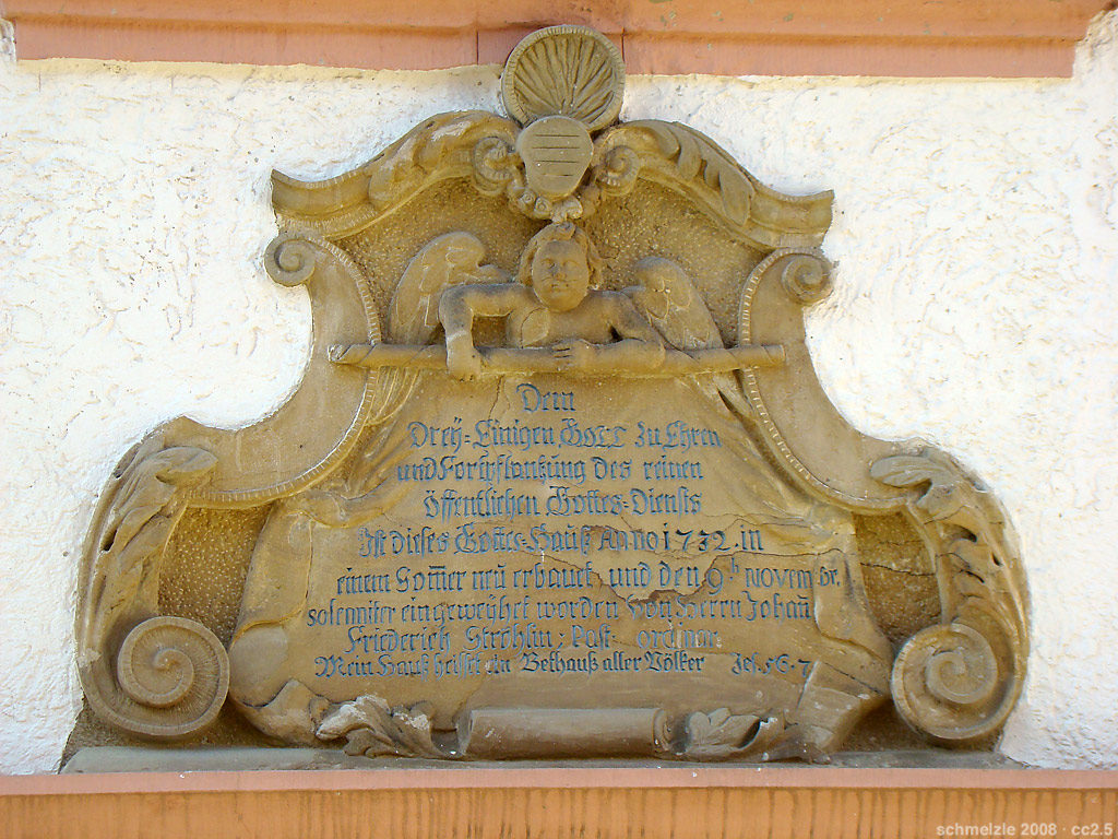 Wappenstein am Westportal der ev. Kirche in Ittlingen